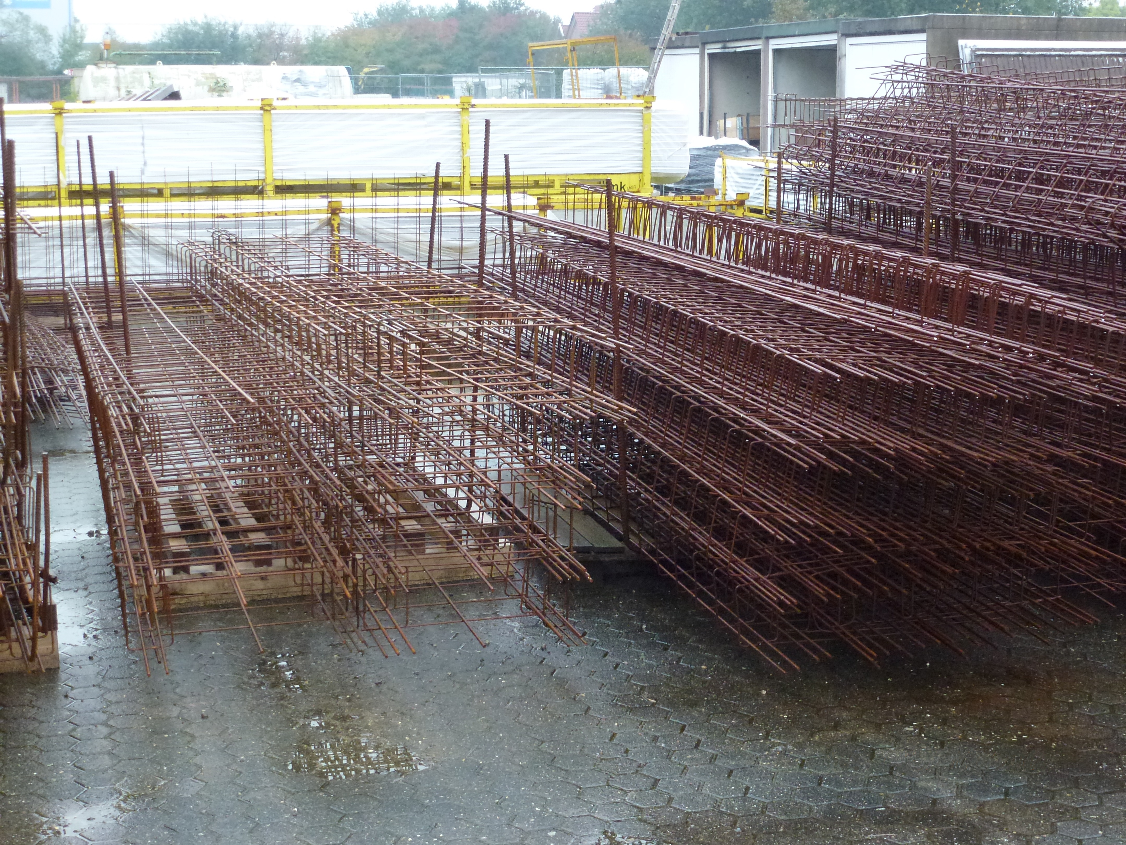 Bewehrungskörbe aus Betonstahlmatten